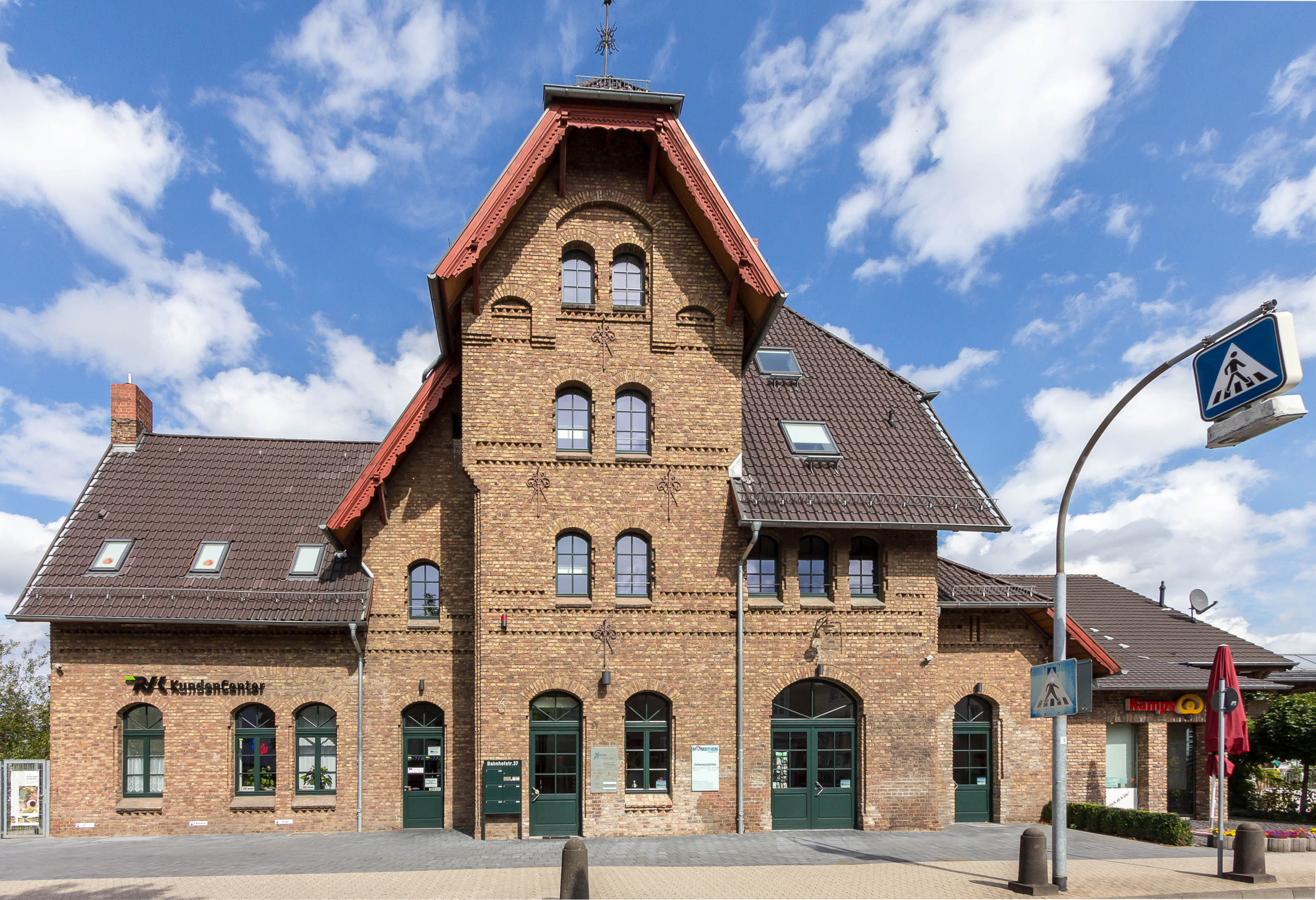 Bahnhof Rheinbach, Straßenseite